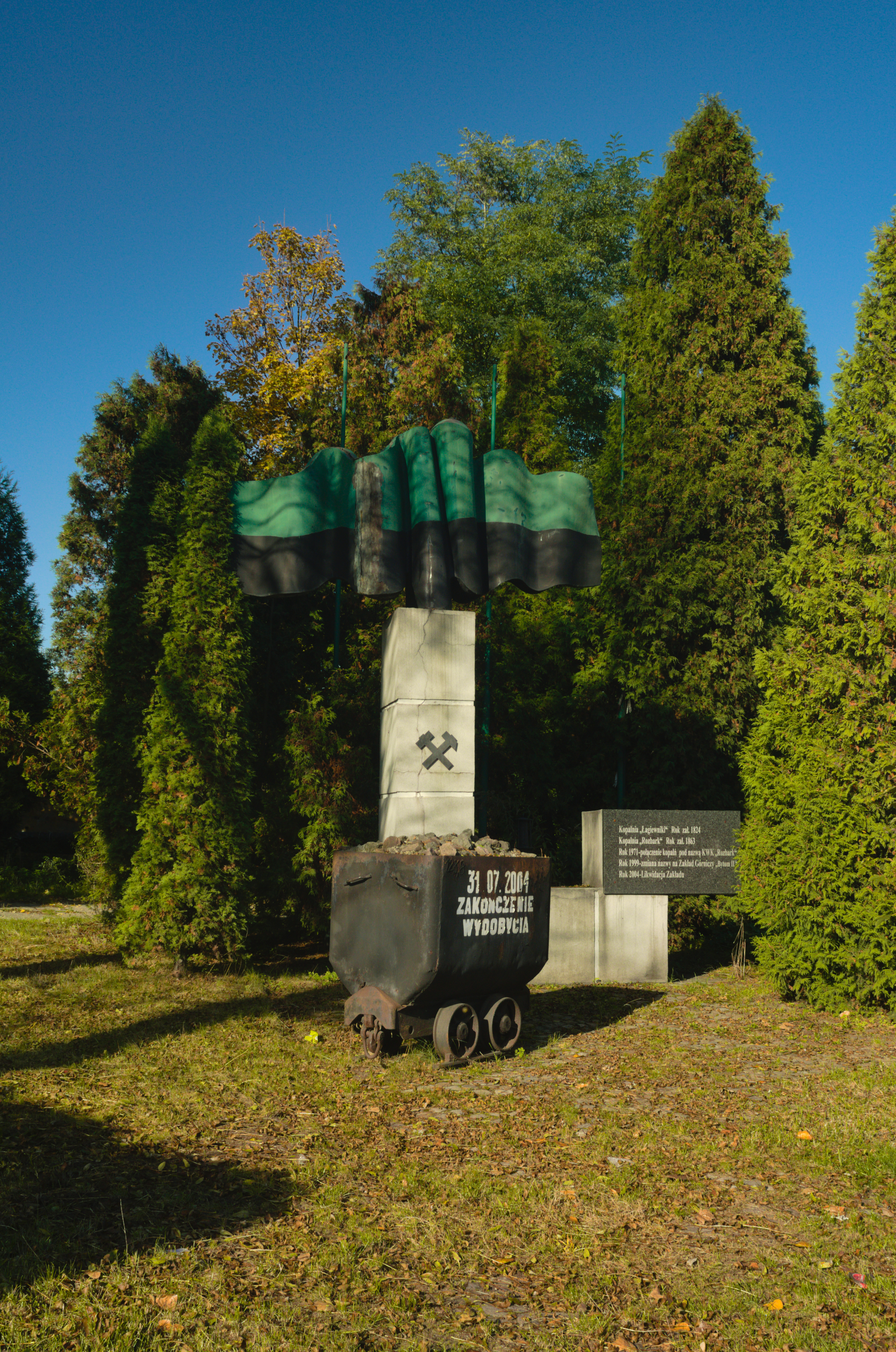 Pomnik upamiętniający kopalnie węgla kamiennego: Rozbark i Łagiewniki, stoi w Bytomiu w pobliżu rejonu głównego kopalni Rozbark, ul. Chorzowska; autor: Andrzej Szczepaniec, odsłonięty w 2005 roku